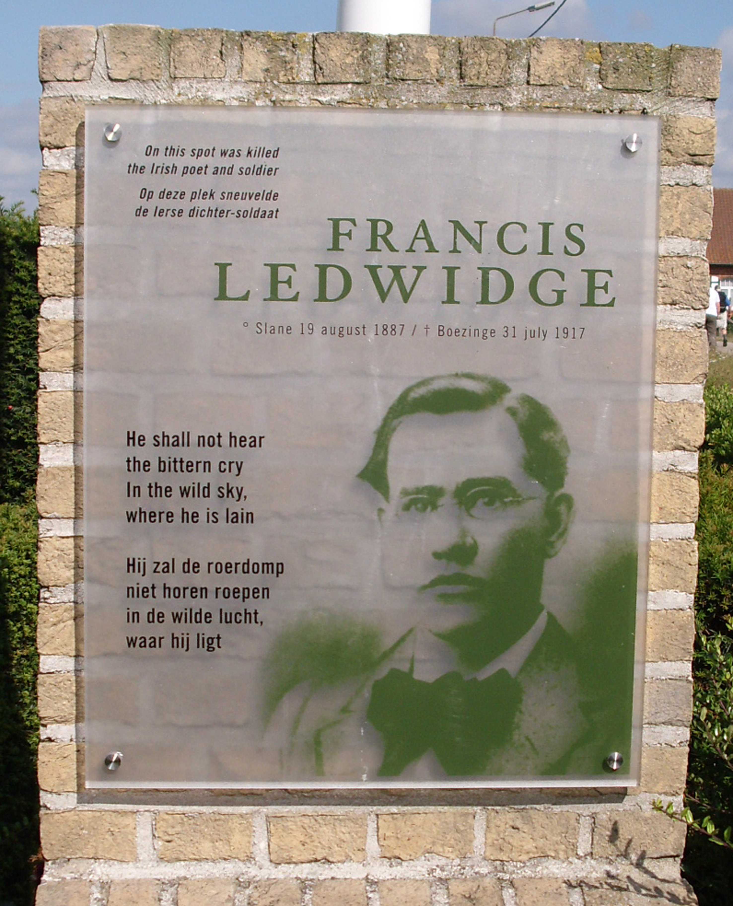 Richard Ledwidge - monument in Boezinge - Ieper - België Datum: 2009/08/22 Eigen foto